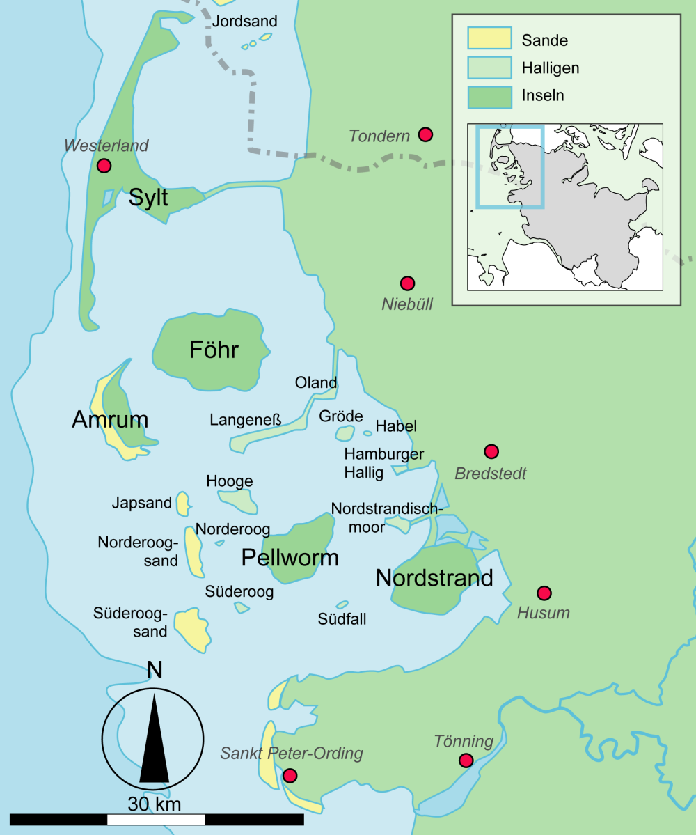 neugezeichnete Version der nordfriesischen Inseln (deutscher Teil); Beltringharder Koog korrigiert